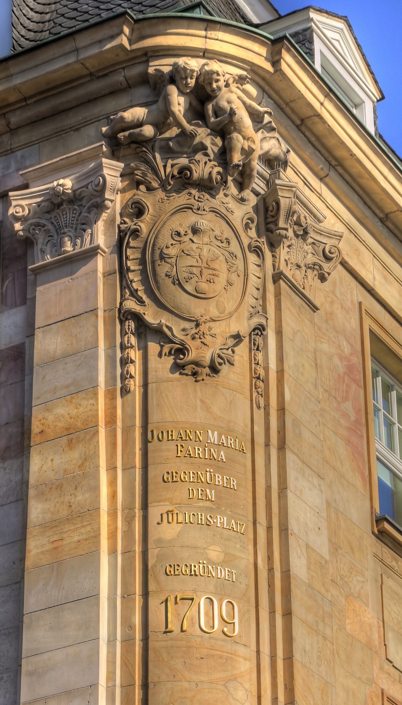 Farina-Haus, Obenmarspforten 21, Köln. Architekten: Emil Schreiterer und Bernhard Below, Baujahr: 1879-99.